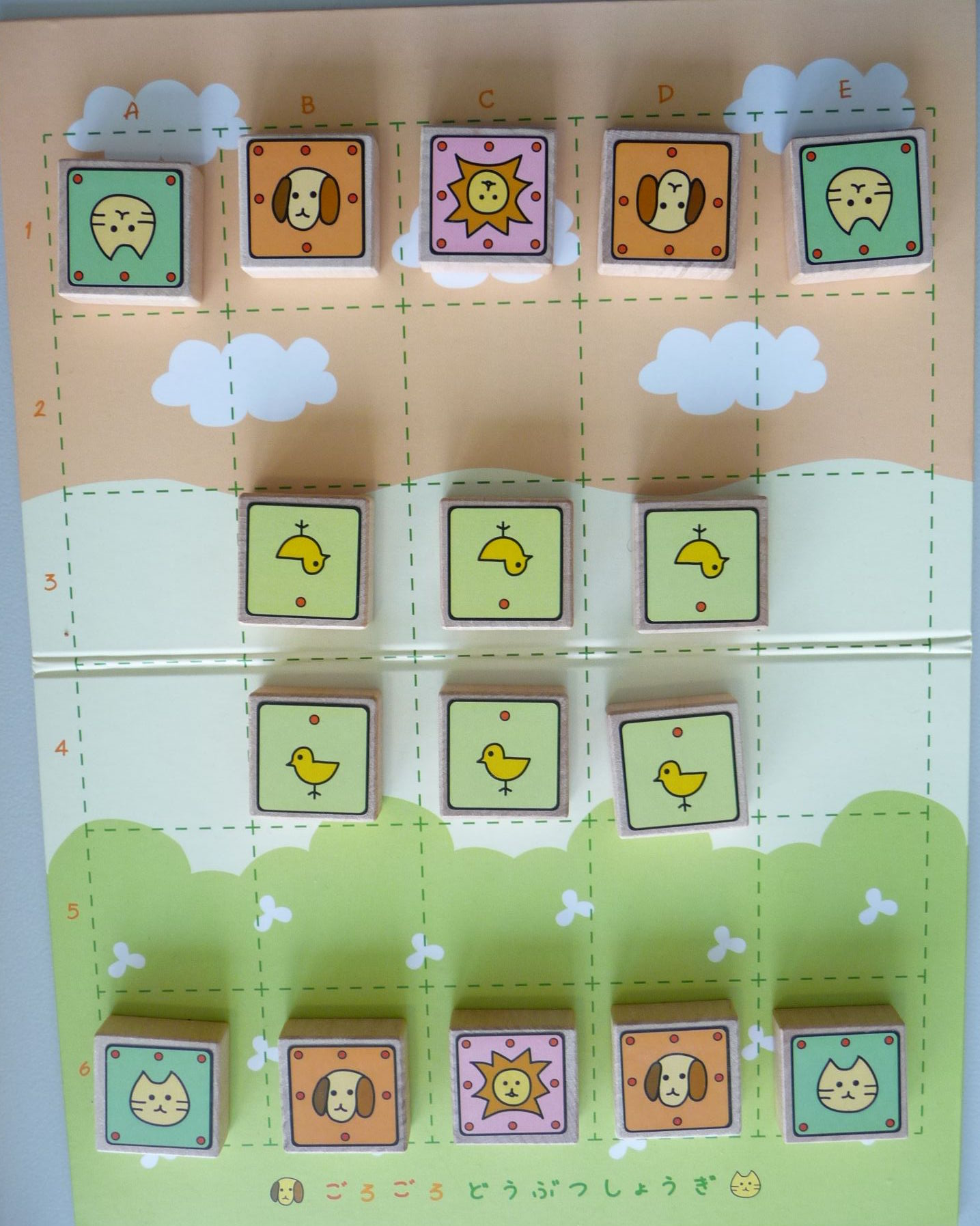 Shogi (japanisches Schach)